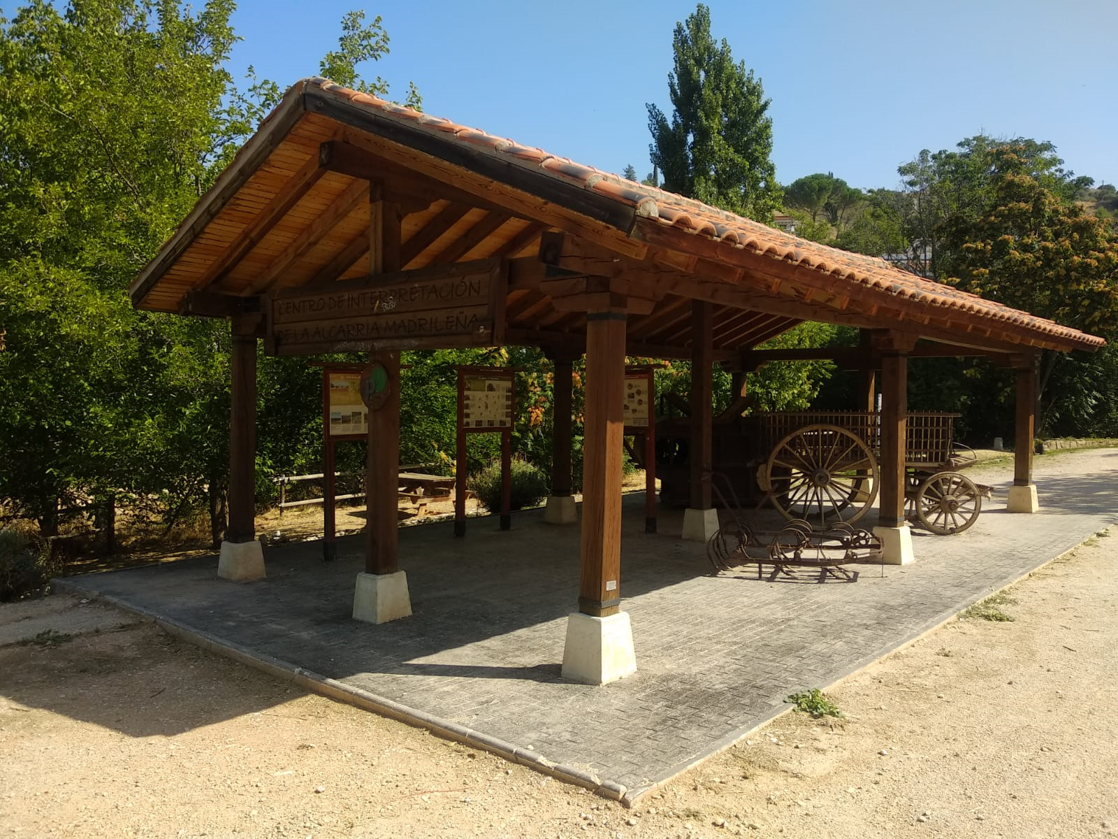 Centro de Interpretación de la Alcarria madrileña, en Olmeda de las Fuentes, Comunidad de Madrid, España.